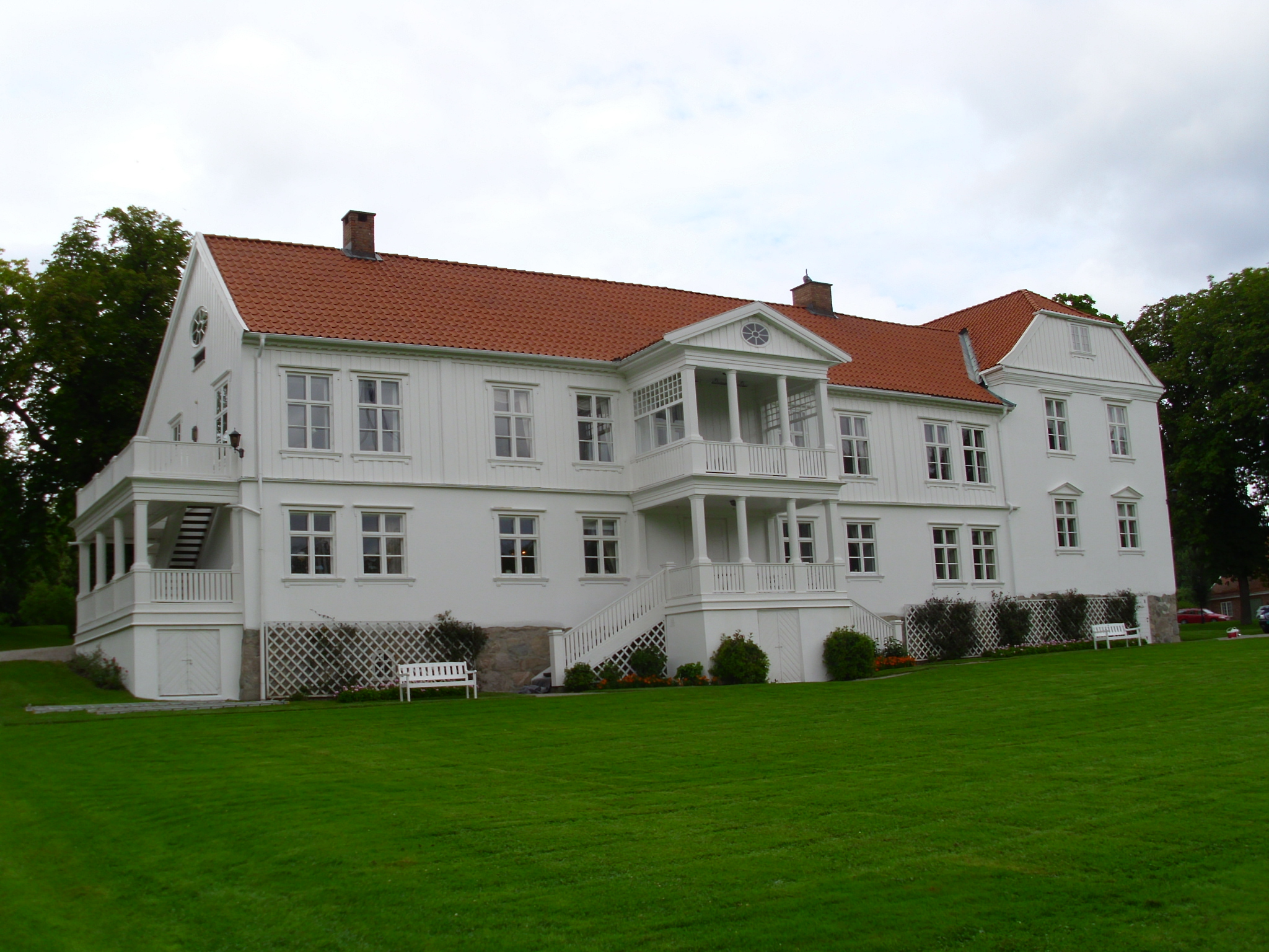 Hauptgebäude des Herrenhauses aus der Sicht von der Pedersens vei Unknown